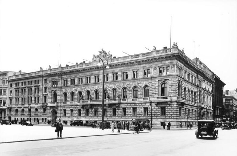 Berlin, Reichsfinanzministerium Berlin, Wilhelmplatz.- Reichsfinanzministerium